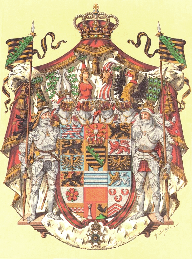 Wappen Deutsches Reich - Herzogtum Sachsen-Meiningen-Hildburghausen (Grosses)